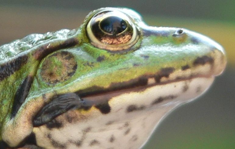 Green frog, Belgium